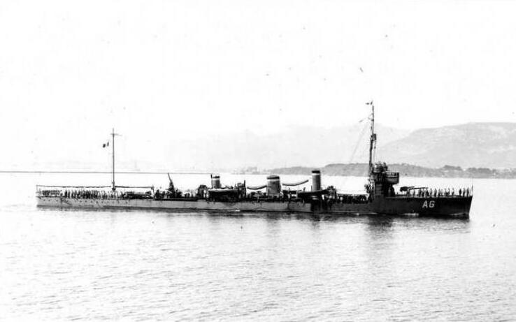 Zerstörer Algerien